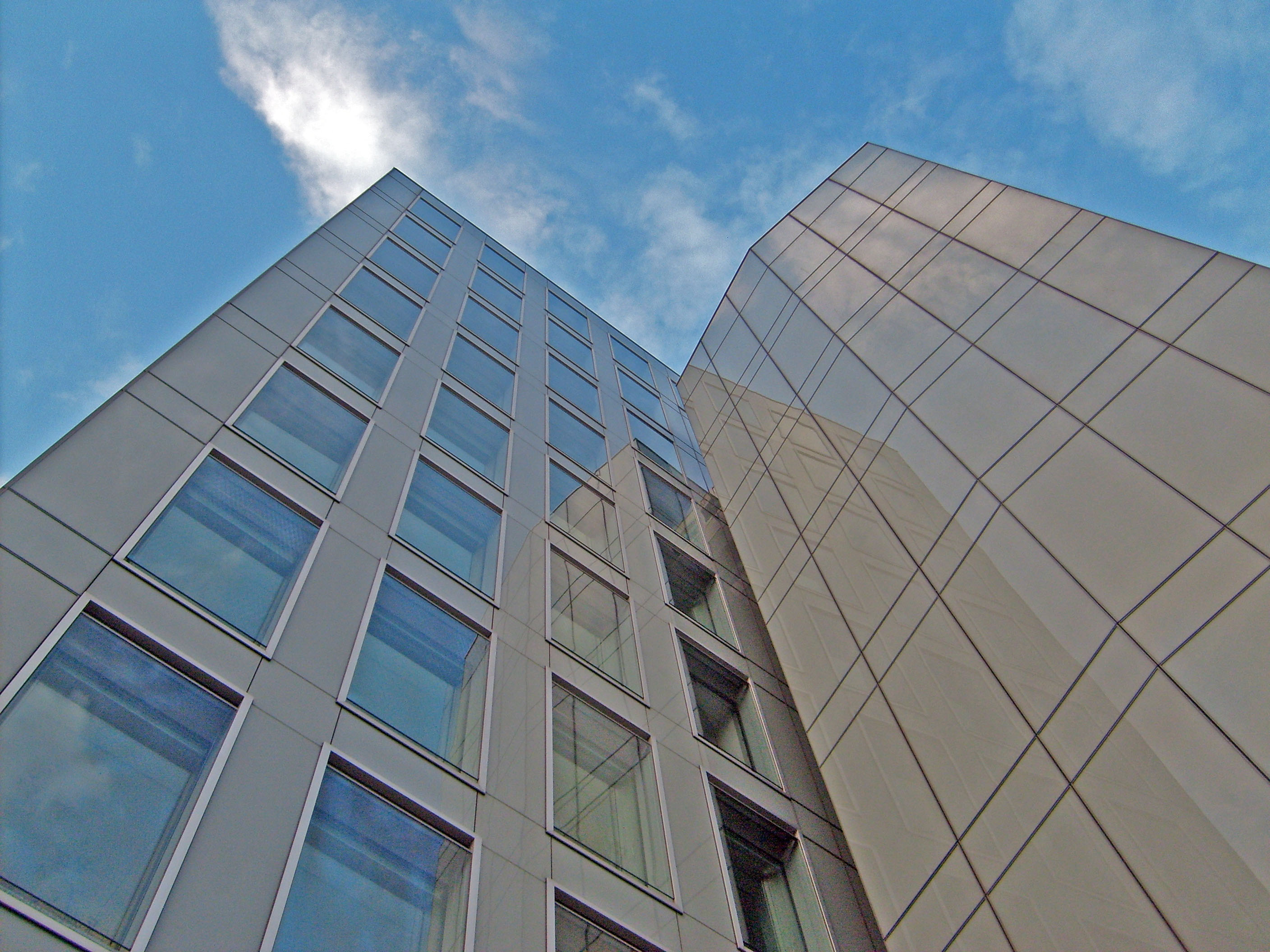 Vierscheibenhaus des WDR - Köln, Nordrhein-Westfalen, Deutschland